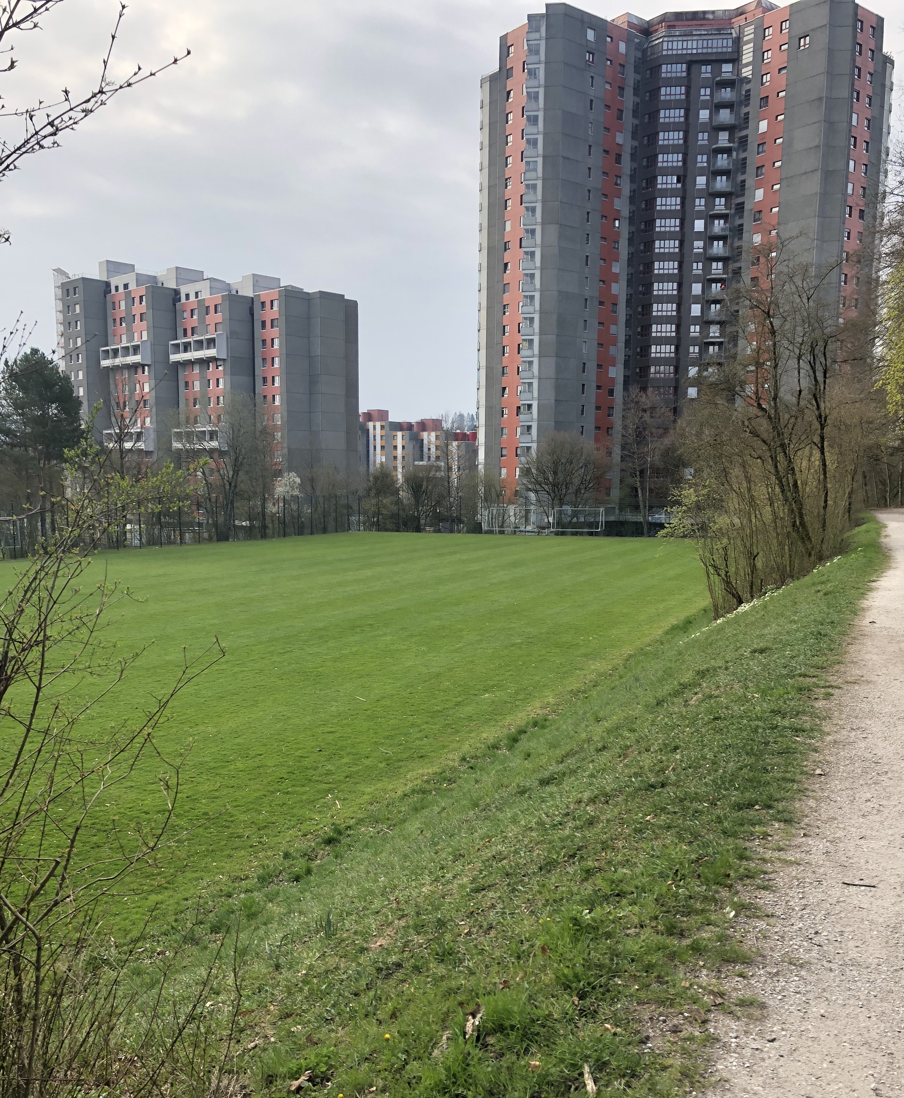 Holenacker Hochhausblick mit Sportplatz im Vordergrund